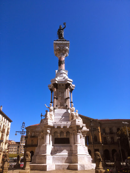 Monumento a los Fueros en Pamplona